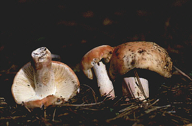 Apfeltäubling Fotograf: Walter J. Pilsak, Waldsassen Copyright Status: GNU Freie Dokumentationslizenz